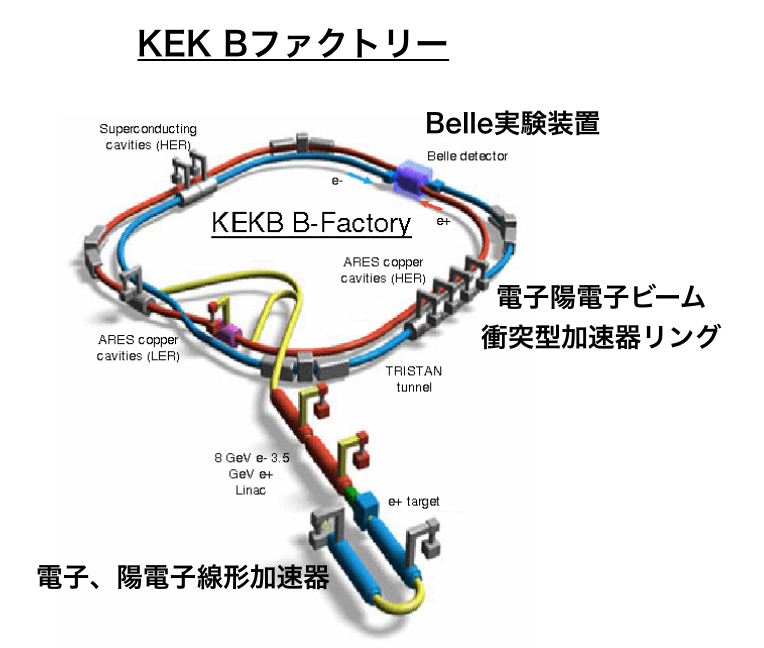 高エネルギー加速器機構（KEK）の電子、陽電子ビーム衝突型の実験施設